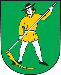 erb obce Lúky